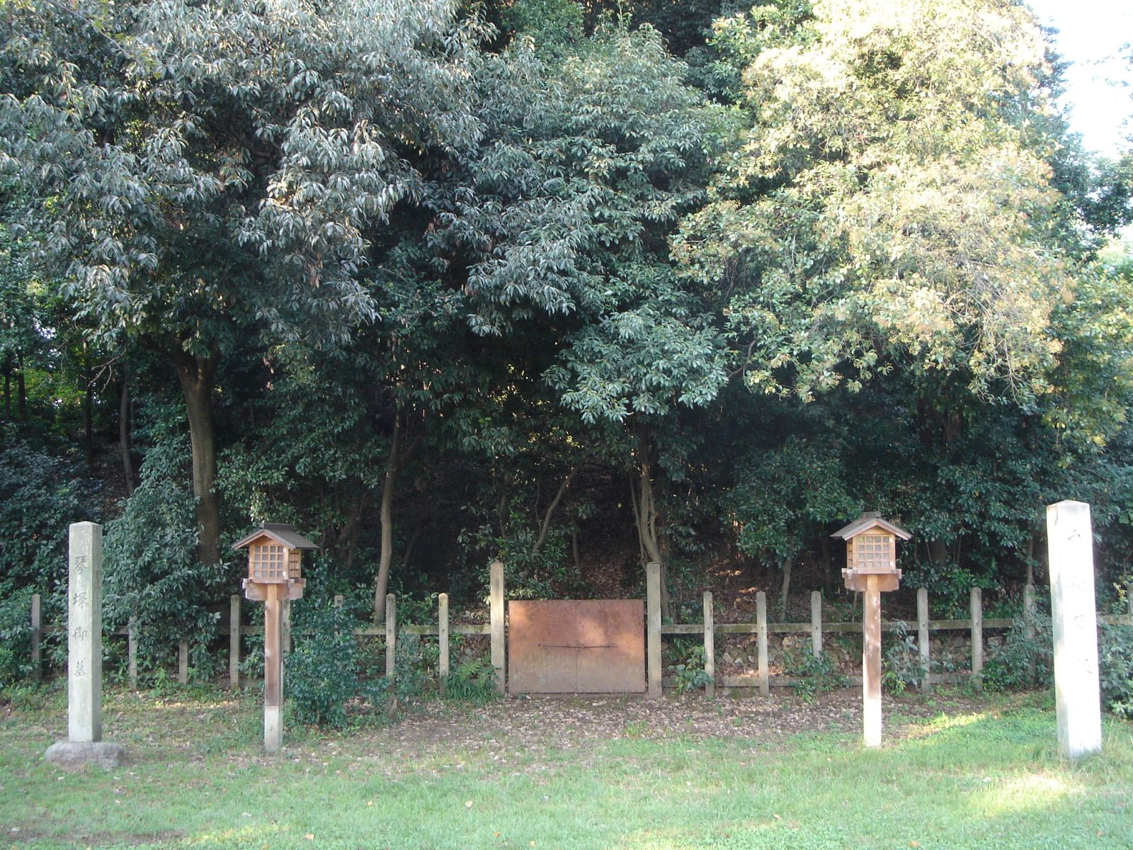 琴塚古墳、岐阜県岐阜市で撮影